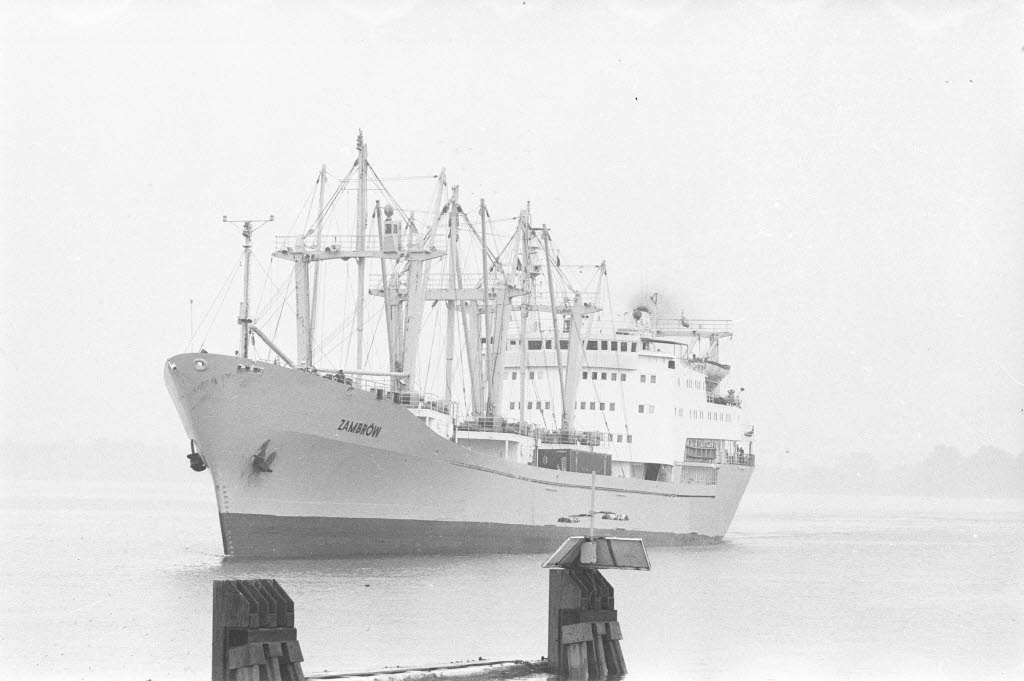 Frachter ZAMBROW (poln.)